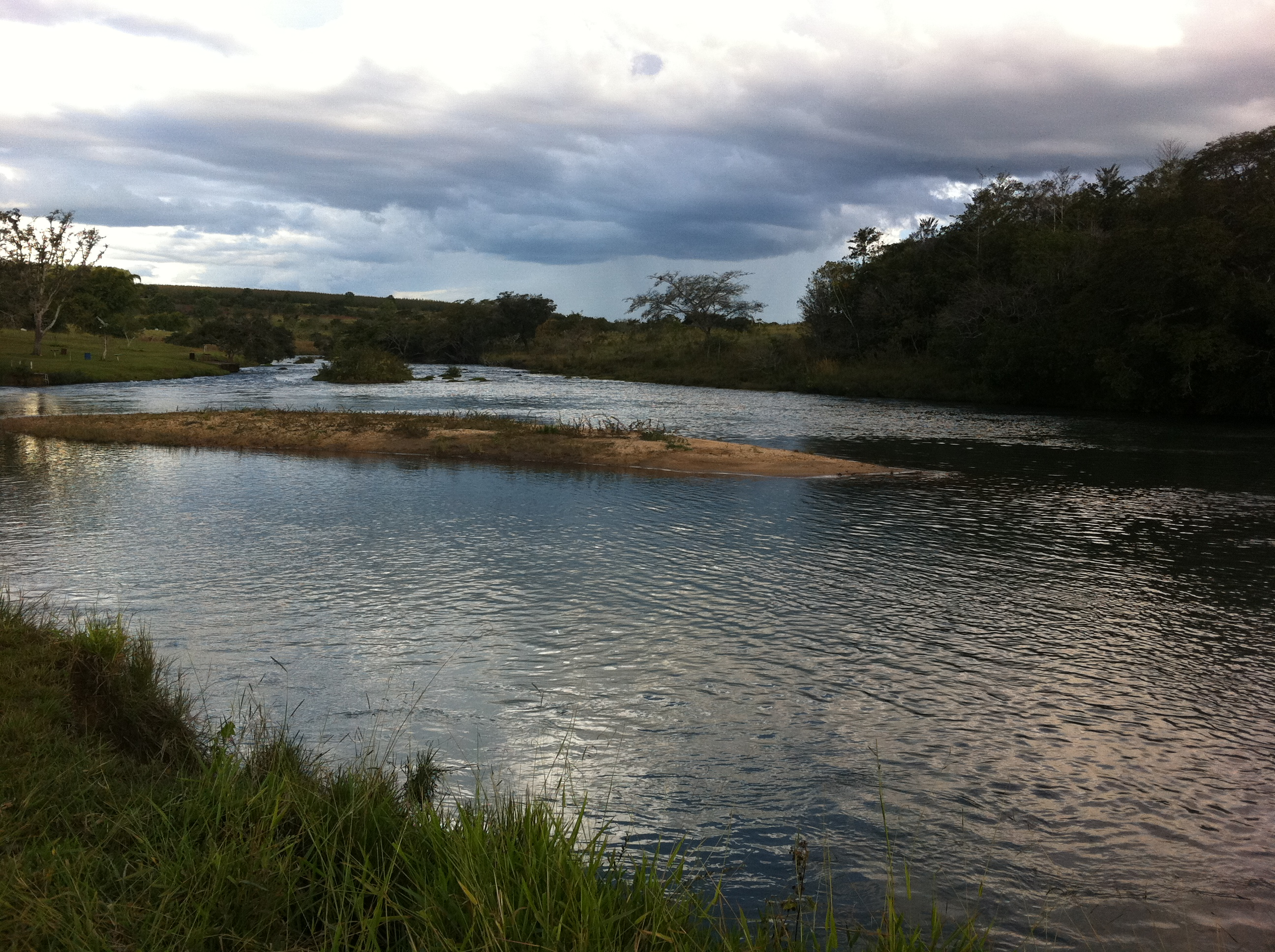 Rio Claro - MG